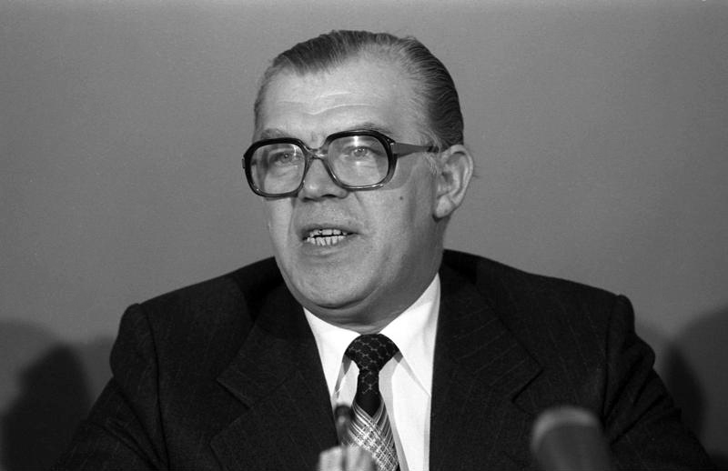 Pressekonferenz der Innenminster der Länder mit Bundesminister Gerhard Rudolf Baum im Bundesrat